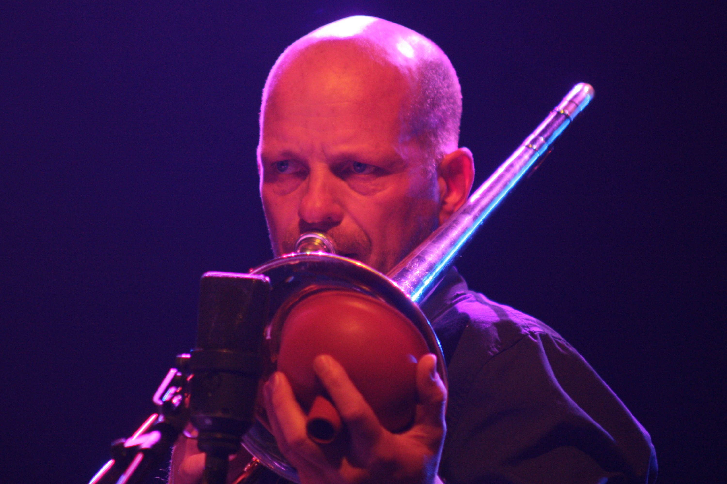 44. Deutsches Jazzfestival Frankfurt 2013: Stefan Lottermann